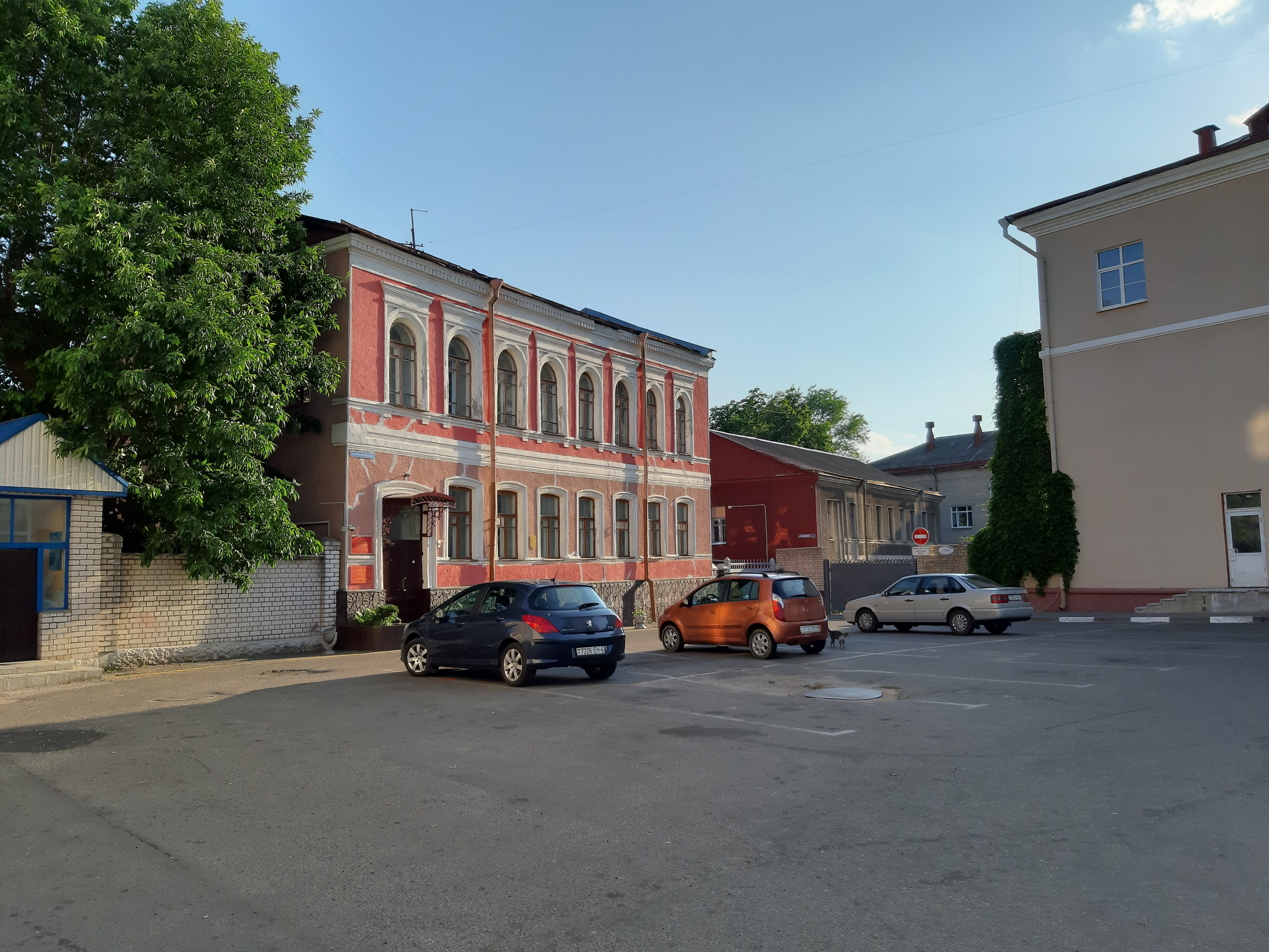 Магілёў. Кавалак Камісарыяцкага завулка